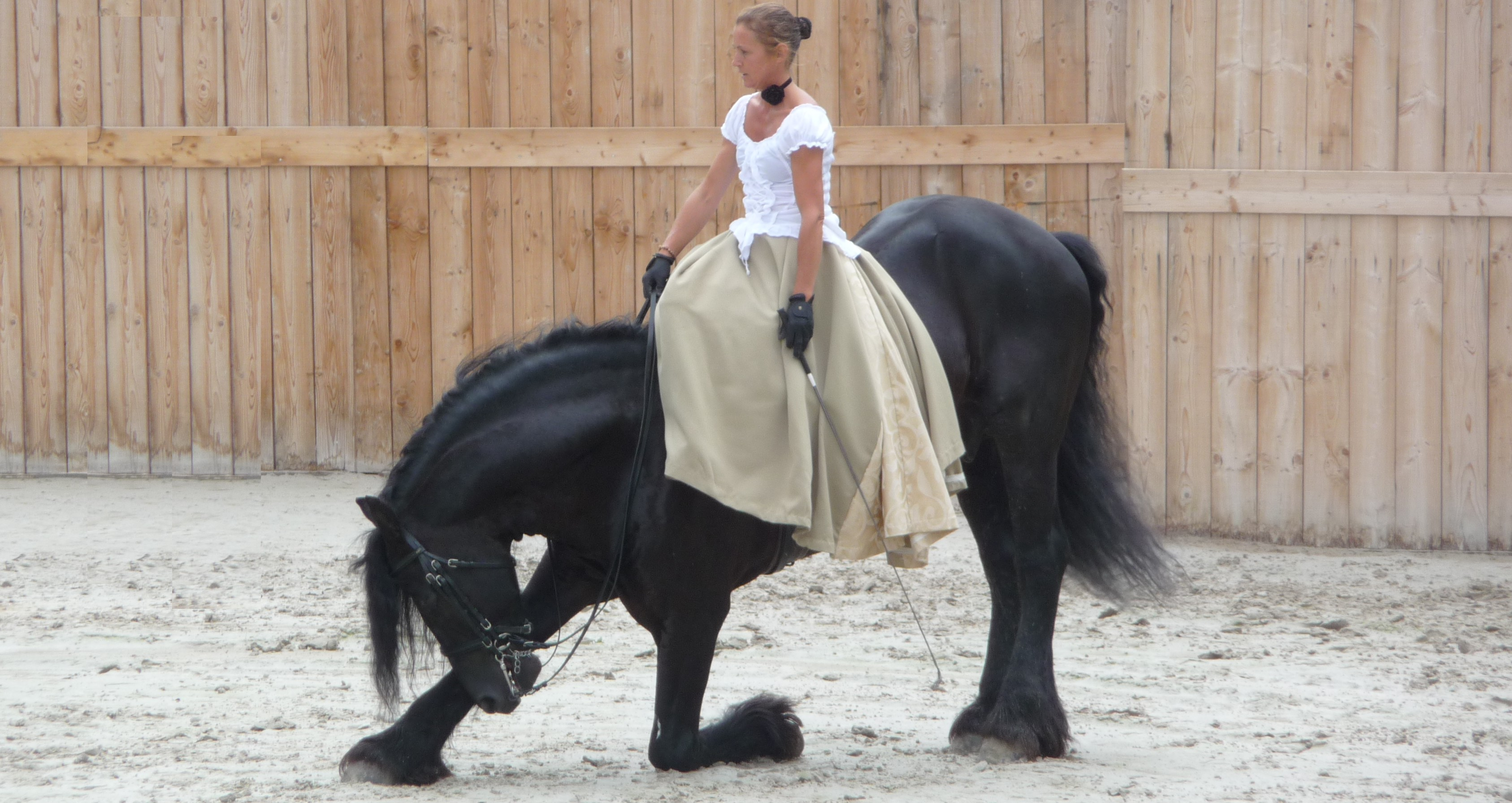 Révérence d'un cheval de race frison et sa cavalière lors d'une démonstration équestre.